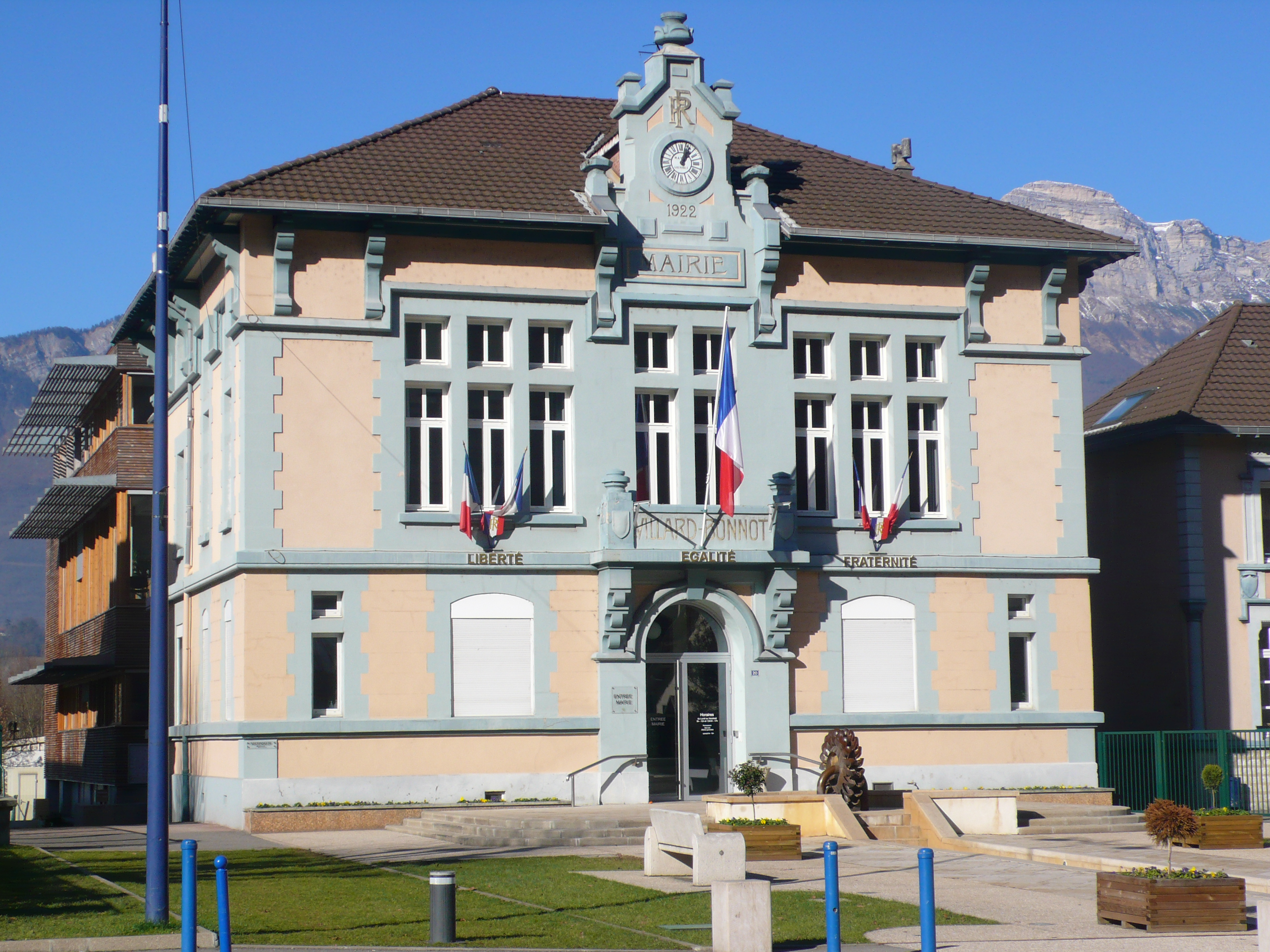 photo de la mairie de villard bonnot